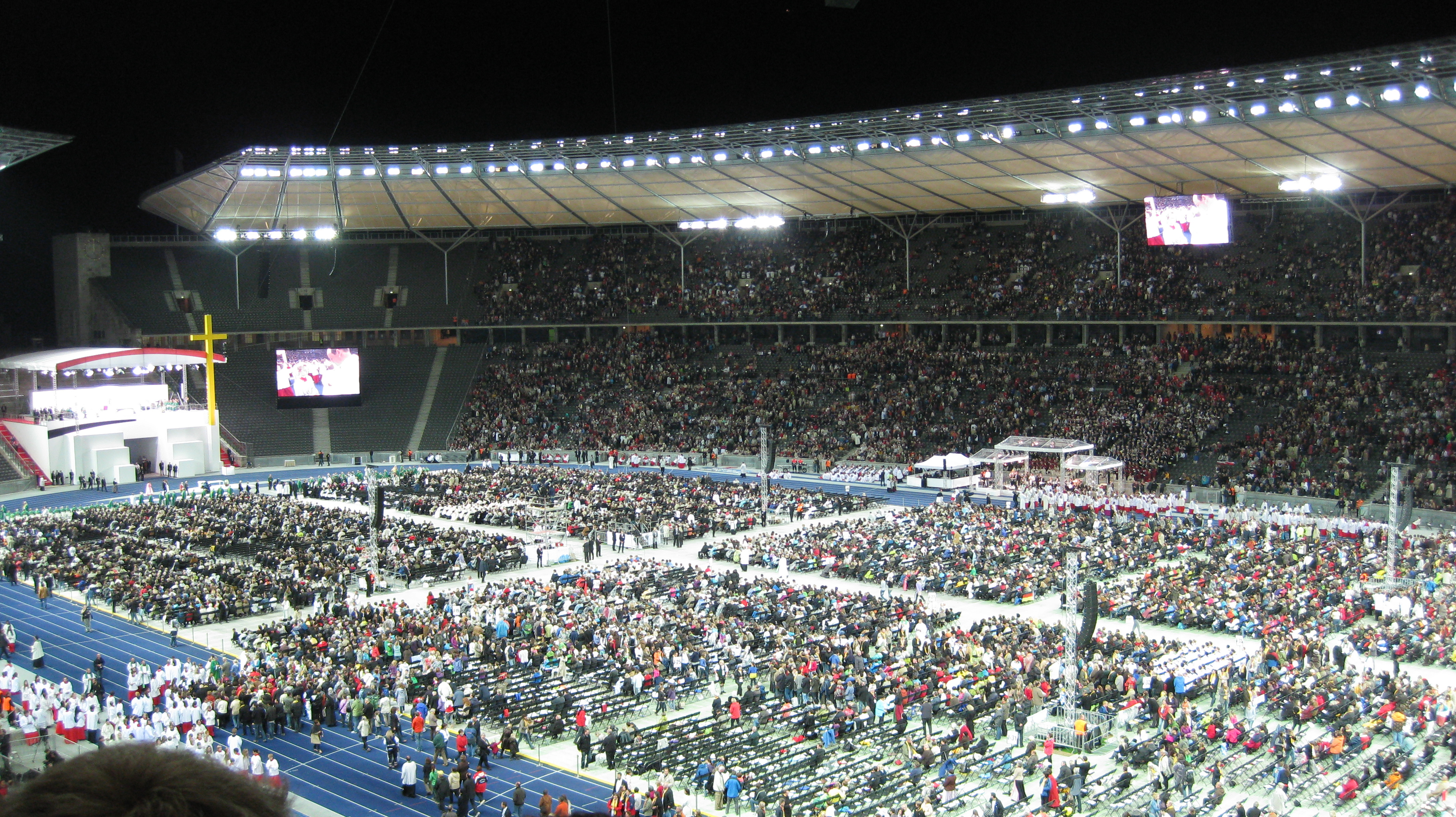 Der Papst feiert mit ca. 60.000 Gläubigen aus aller Welt die Hl. Messe im Olympiastadion in Berlin.